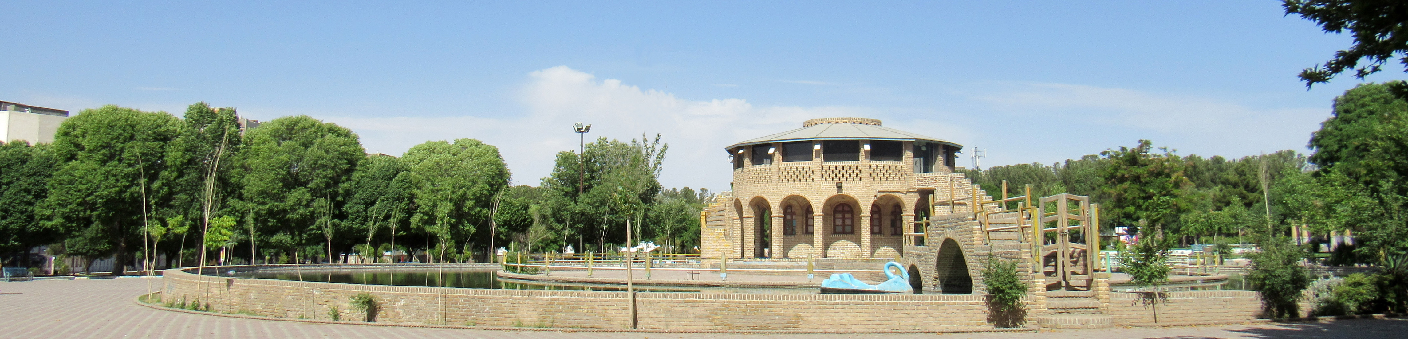 سراسرنمایی از پارک لاله در سبزوار